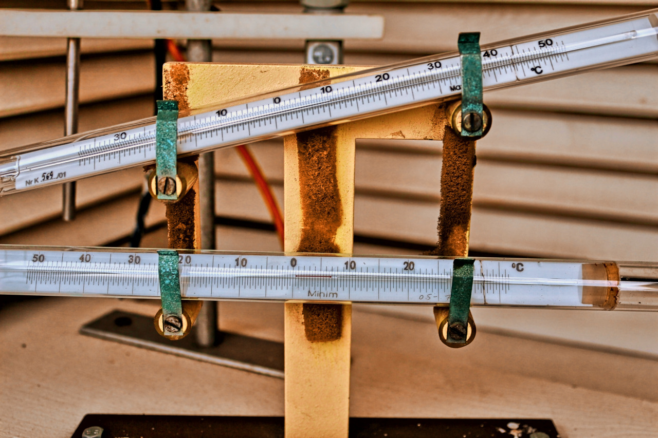 Radzyń, stacja hydrologiczna IMGW